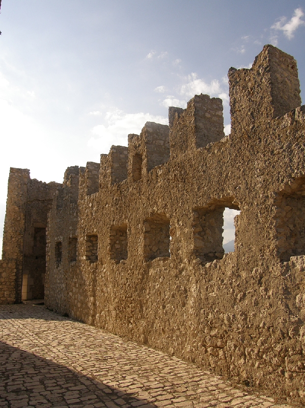 Rocca Calascio